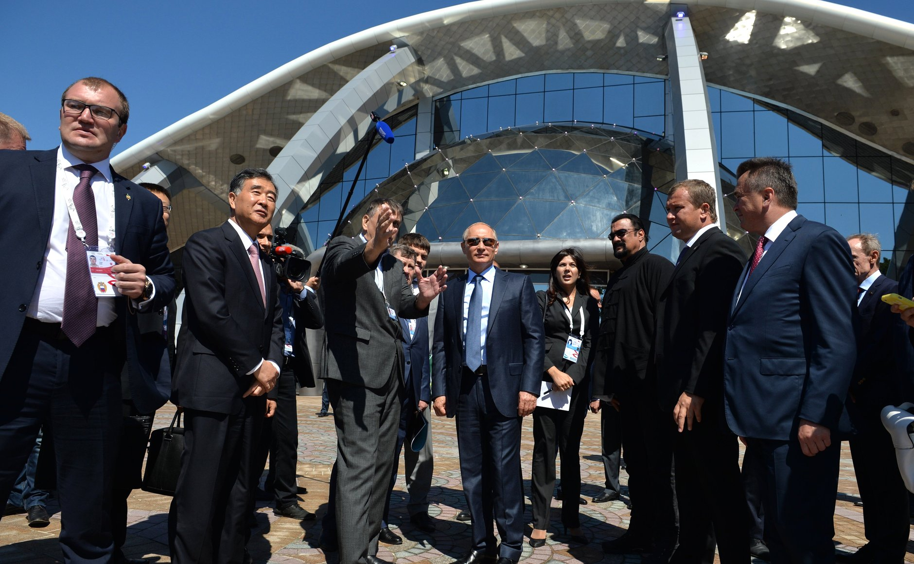 Владимир Путин в океанариуме на острове Русский. В сопровождении губернатора Приморского края Владимира Миклушевского, вице-премьера Госсовета КНР Ван Яна и американского актёра Стивена Сигала